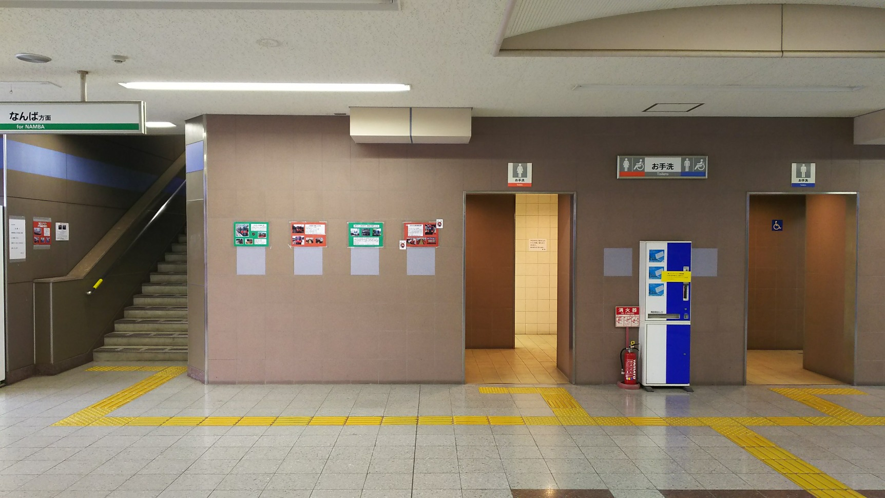 御幸辻駅コンコース